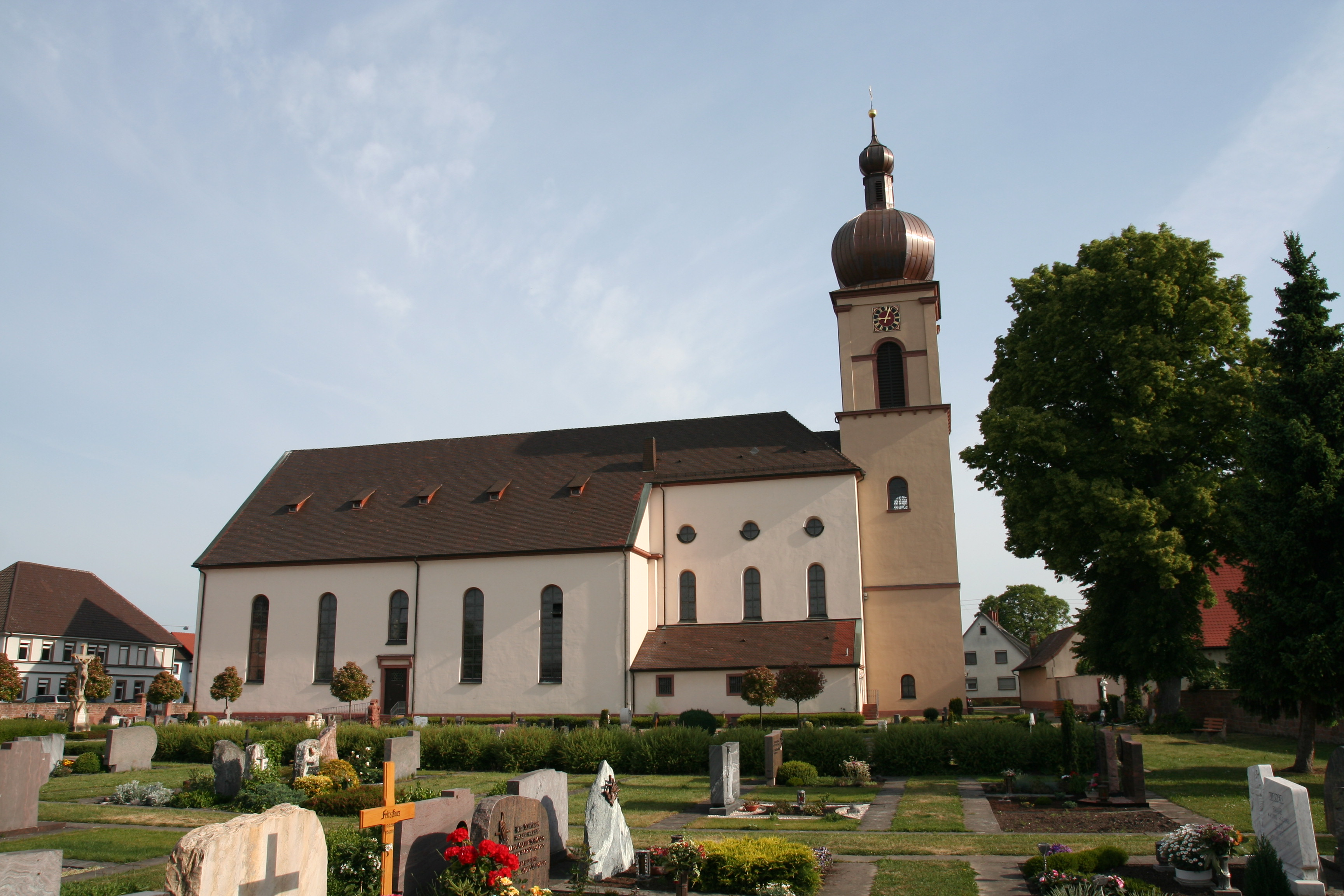 Katholische Kirche St. Cyprian in Kappel am Rhein, 1826 bis 1828 nach Plänen von Hans Voss erbaut